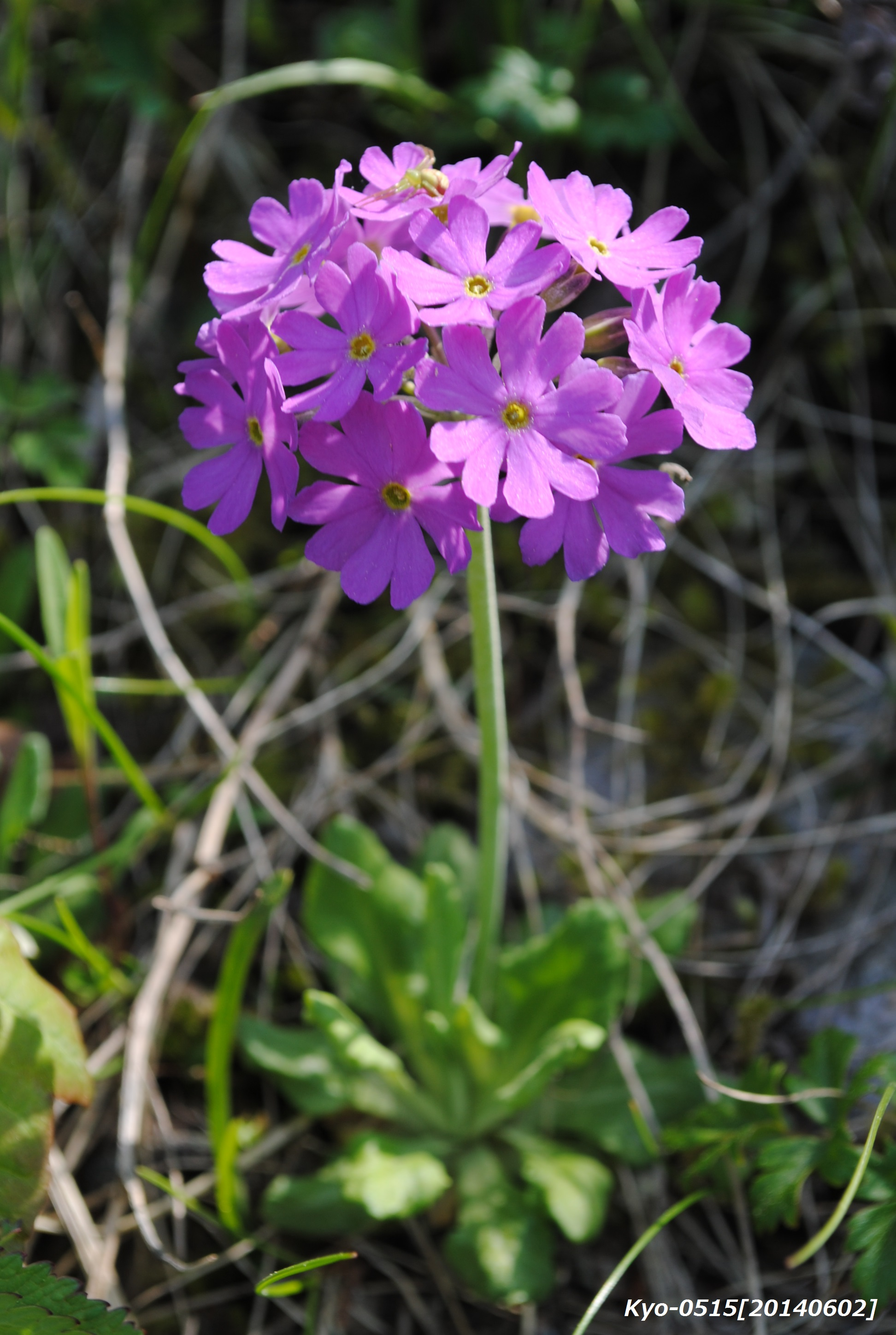 礼文島にて